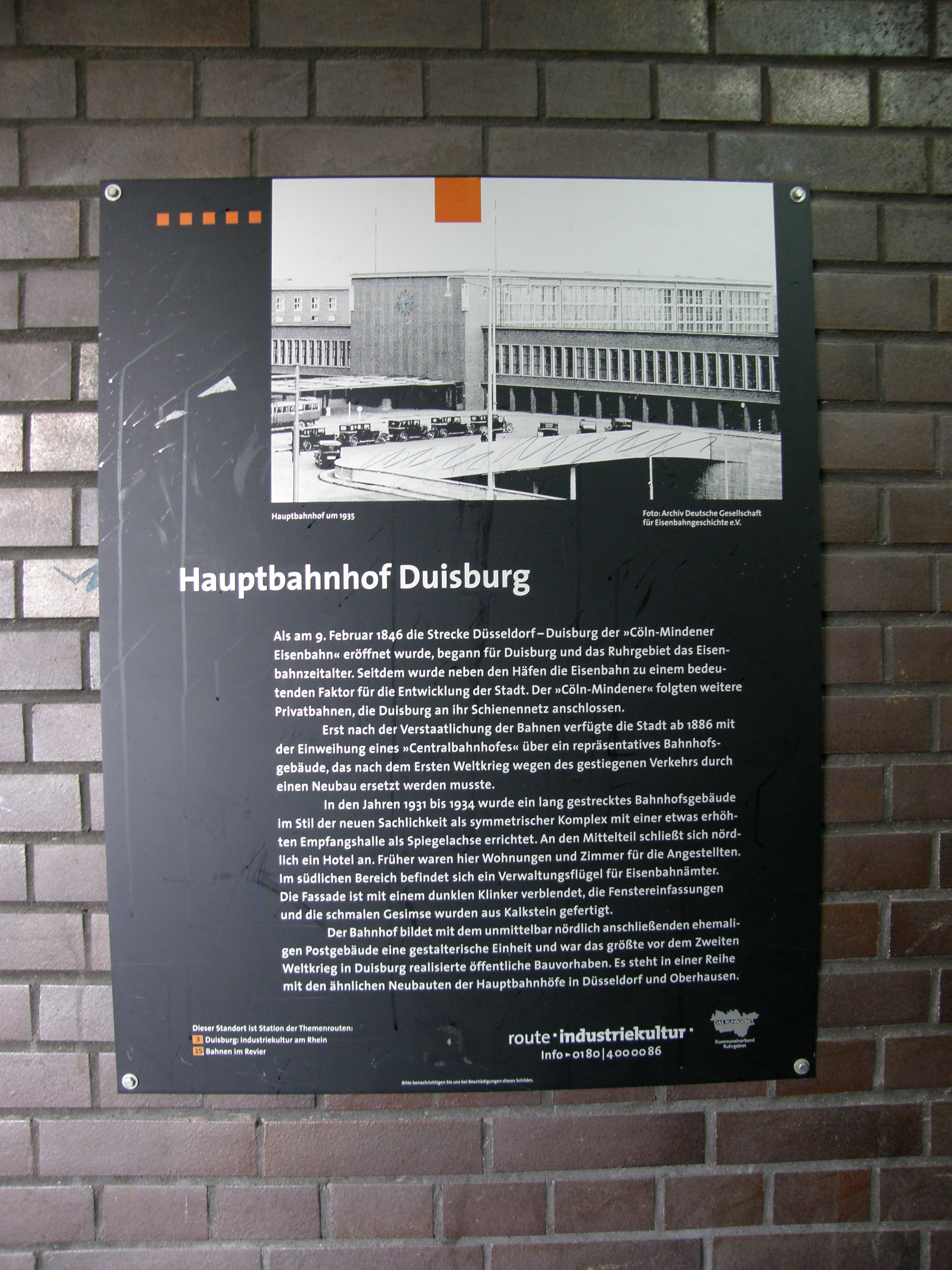 Innenhafen Duisburg